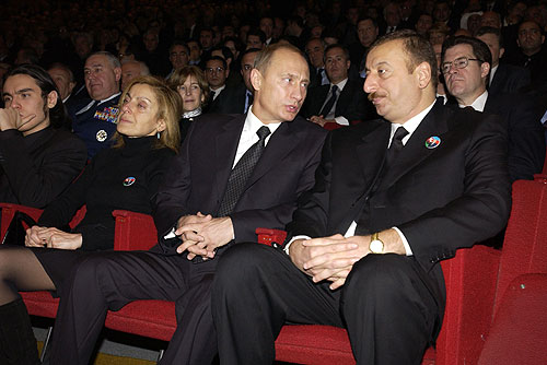 C Президентом Азербайджана Ильхамом Алиевым во время церемонии прощания с Гейдаром Алиевым